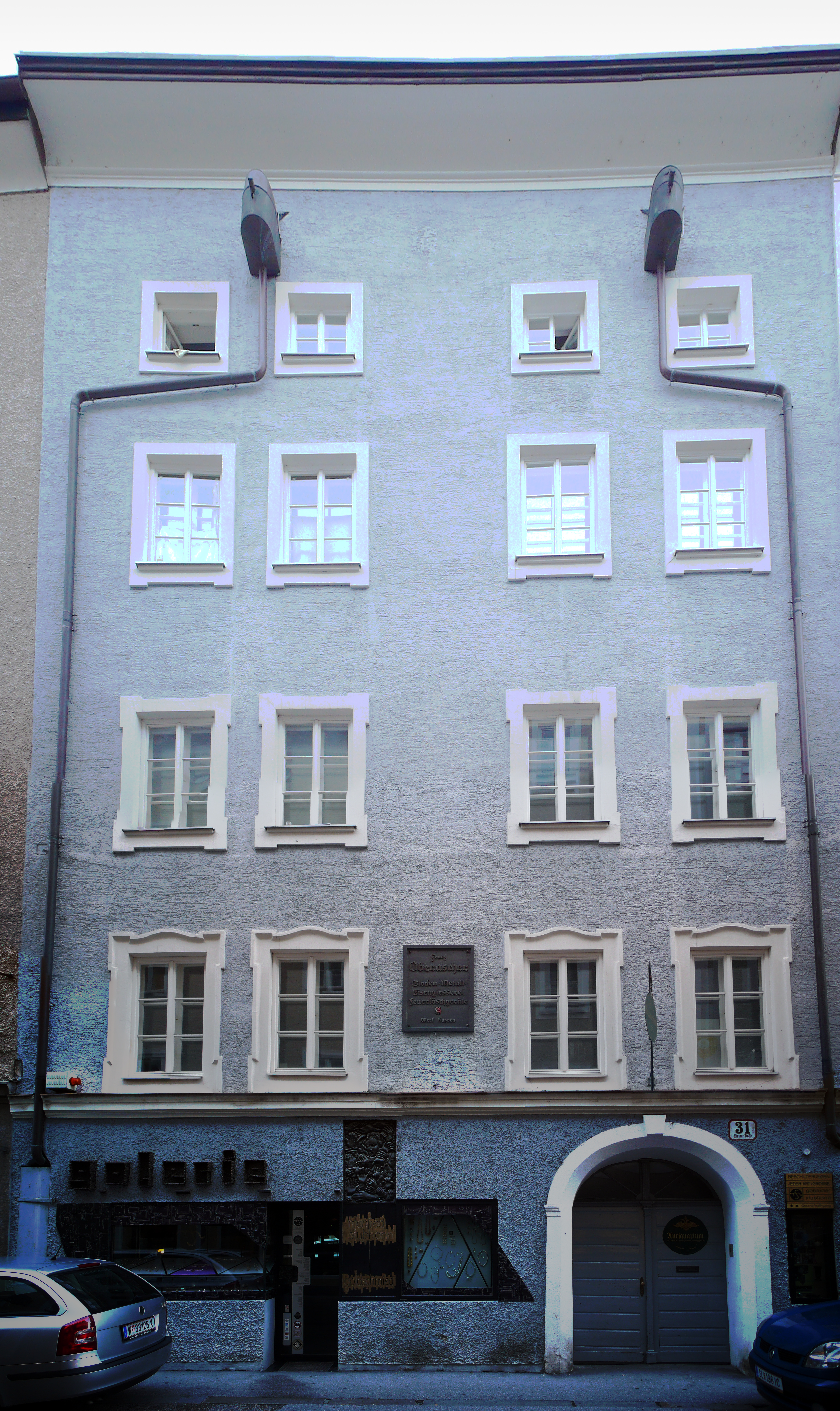 Bürgerhaus, ehem. Glockengießerei Oberascher, Linzer Gasse 31, Stadt Salzburg, Österreich.